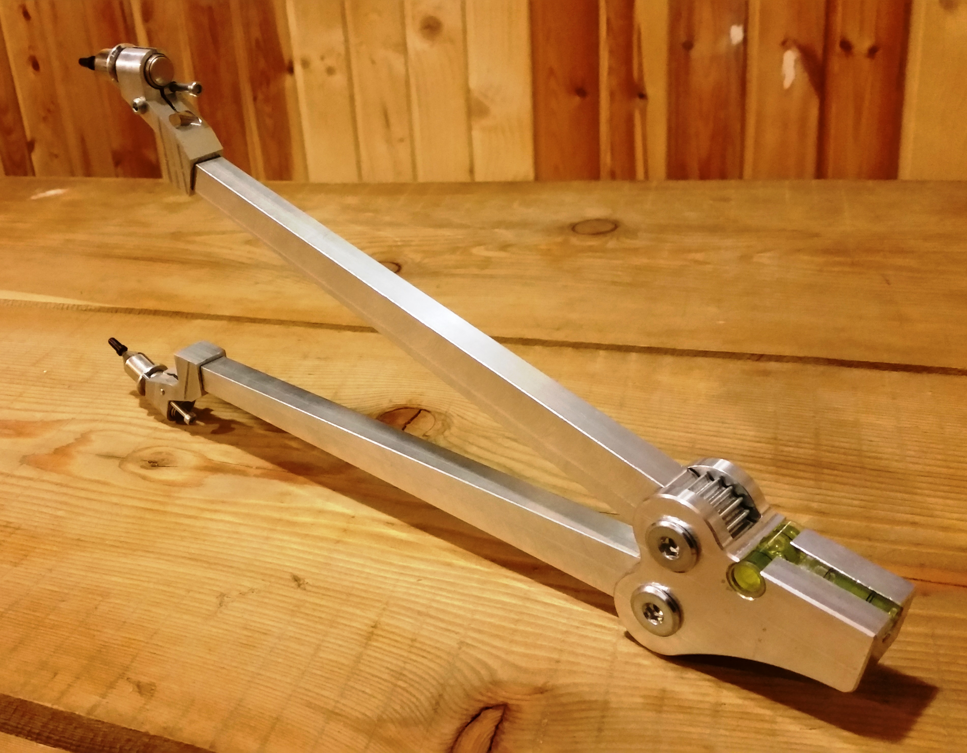 Плотницкая черта с самовыравнивающимися уровнями и вращающимися стержнями